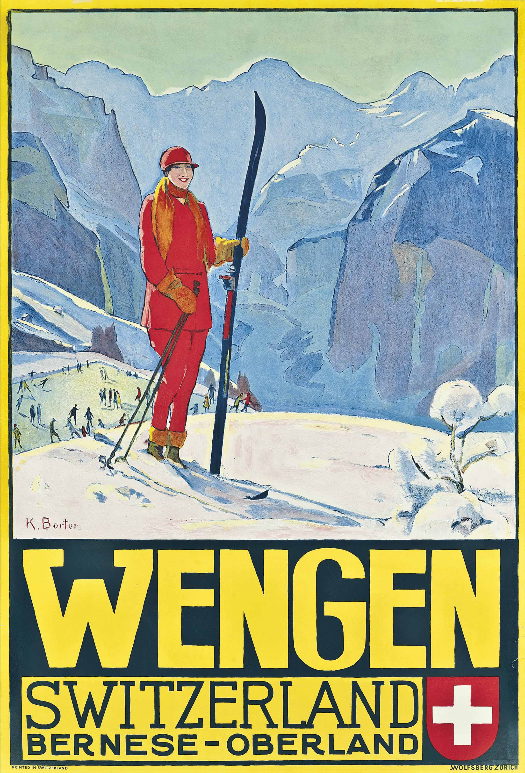 Klara Borter Wengen Plakat circa 1933 104 x 67cm